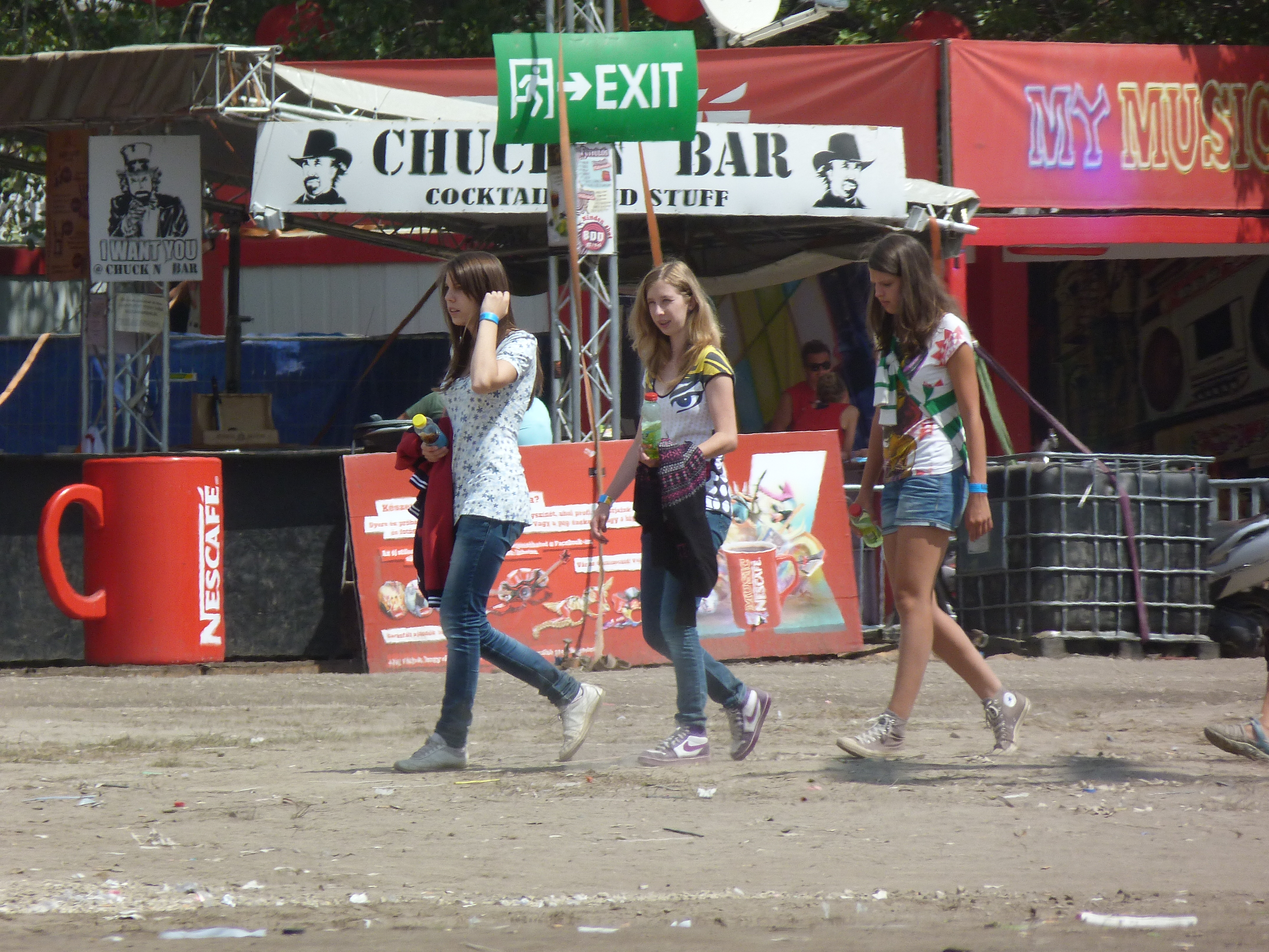 Live on the 12th of August, 2012. Budapest, the Sziget Festival. Published under Creative Commons in the Metapolisz DVD line. A felvételek 2012. Augusztus 12 –én vasárnap készültek Budapesten, a Sziget Fesztiválon. Megjelent Creative Commons alatt a Metapolisz DVD sorozatban.